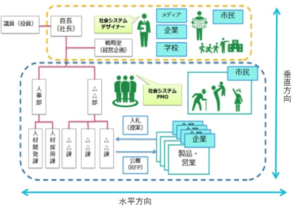 社会システムデザイナーの役割範囲と社会システムPMOの役割範囲を垂直・水平にて説明